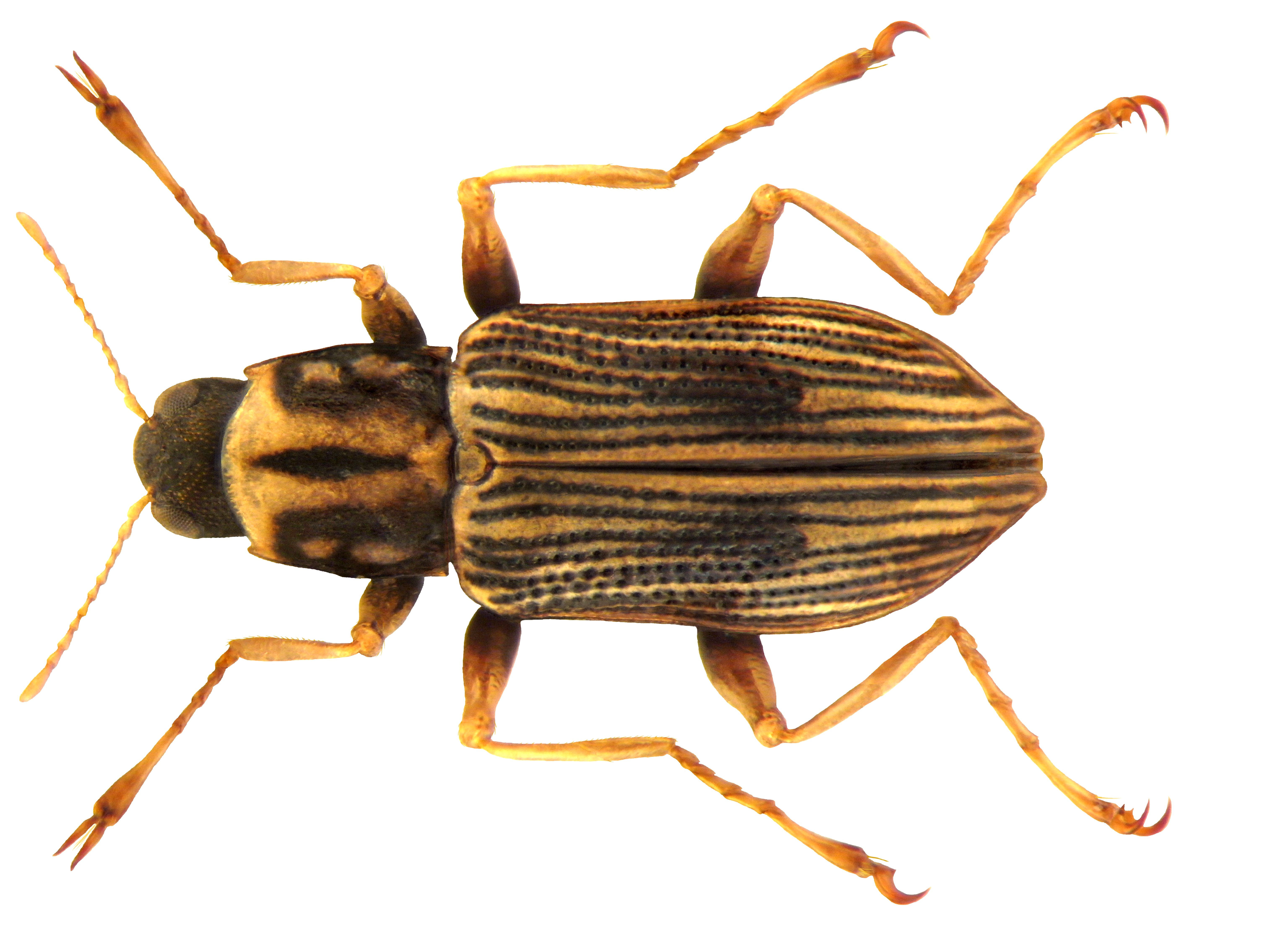 Familie: Elmidae Groesse: 3,7 mm Fundort: China, Süd-Yunnan, Jinghong, Gou Men Shan, 1080 m leg. A.W., 2008; det. A.Skale, 2008 Photo: U.Schmidt, 2010